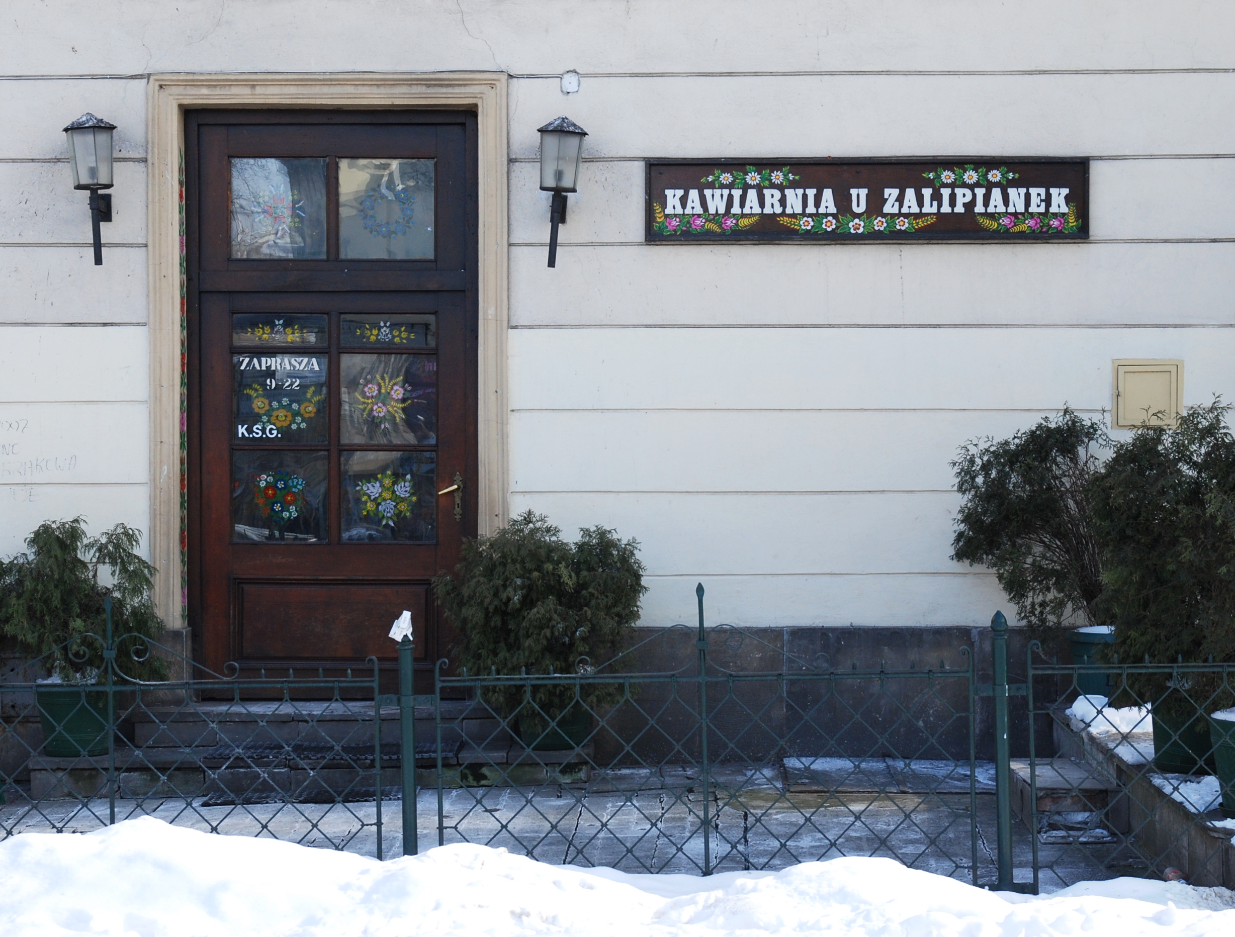 "U Zalipianek". Róg Plant i ul. Szewskiej. Kraków